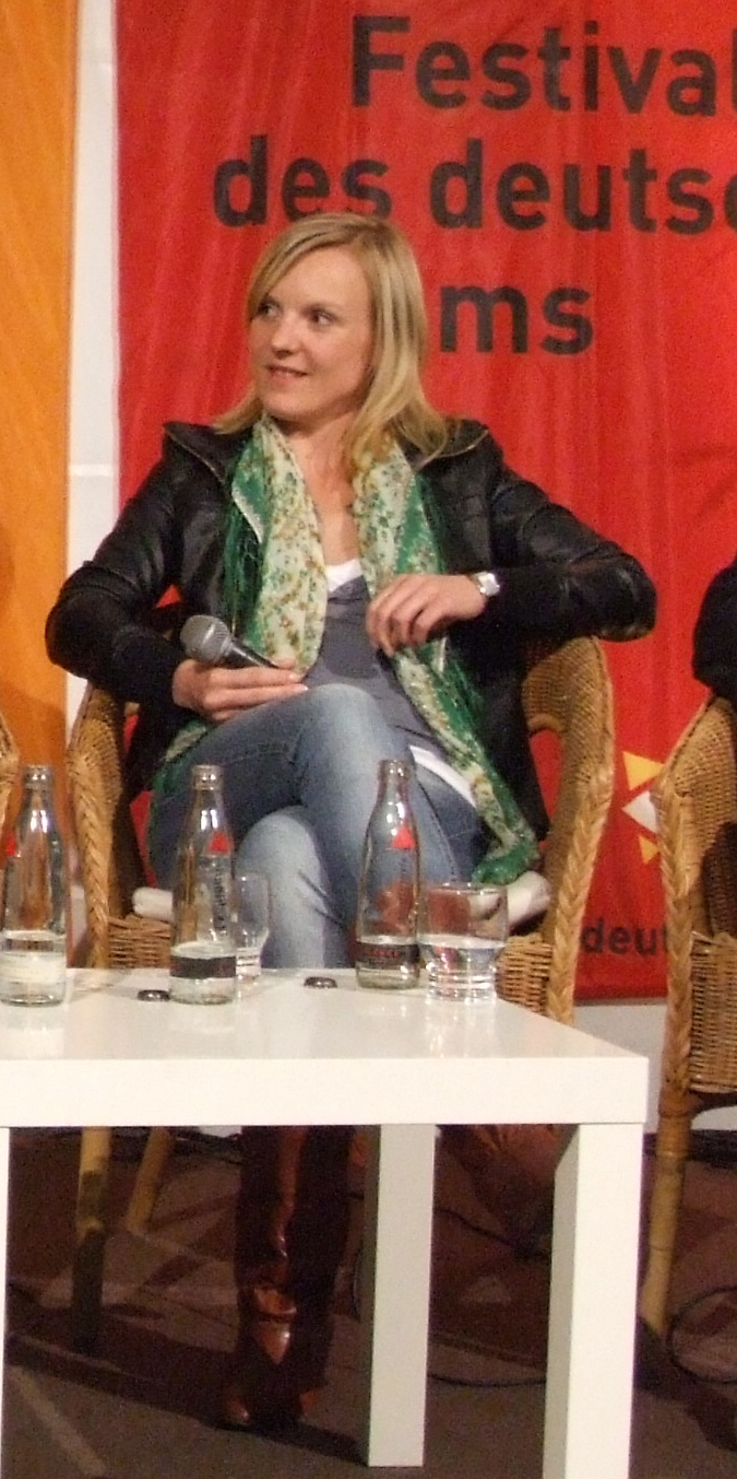 Die deutsche Schauspielerin Kirstin Fischer, 2009, beim Filmgespräch während des "Festivals des Deutschen Films" über den Film "Das Zimmer im Spiegel" bei dem sie die Hauptrolle der jüdischen Ärztin Luisa übernahm.